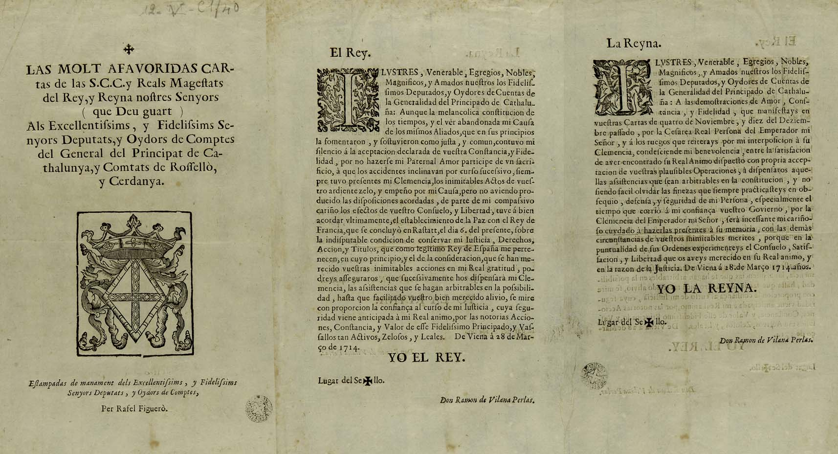 Carta de Carlos de Austria anunciando el Tratado de Rastatt a los diputados de la Generalidad de Cataluña 1714